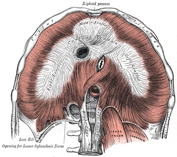 Diaphragm - 2.png